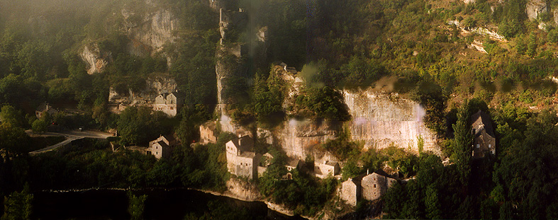 Village de Castelbouc - Lozère (près de Sainte-Enimie) dans les Gorges du Tarn.